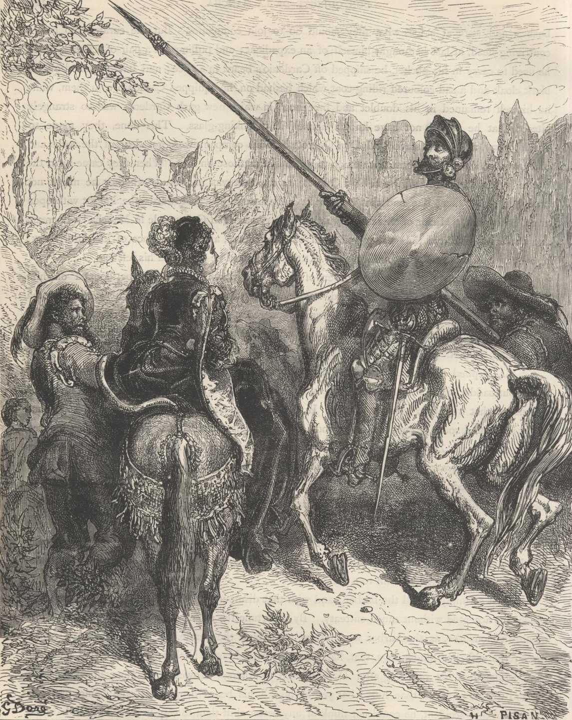 Ilustração de Gustave Doré para a edição de 1863 de "Dom Quixote" de Miguel de Cervantes